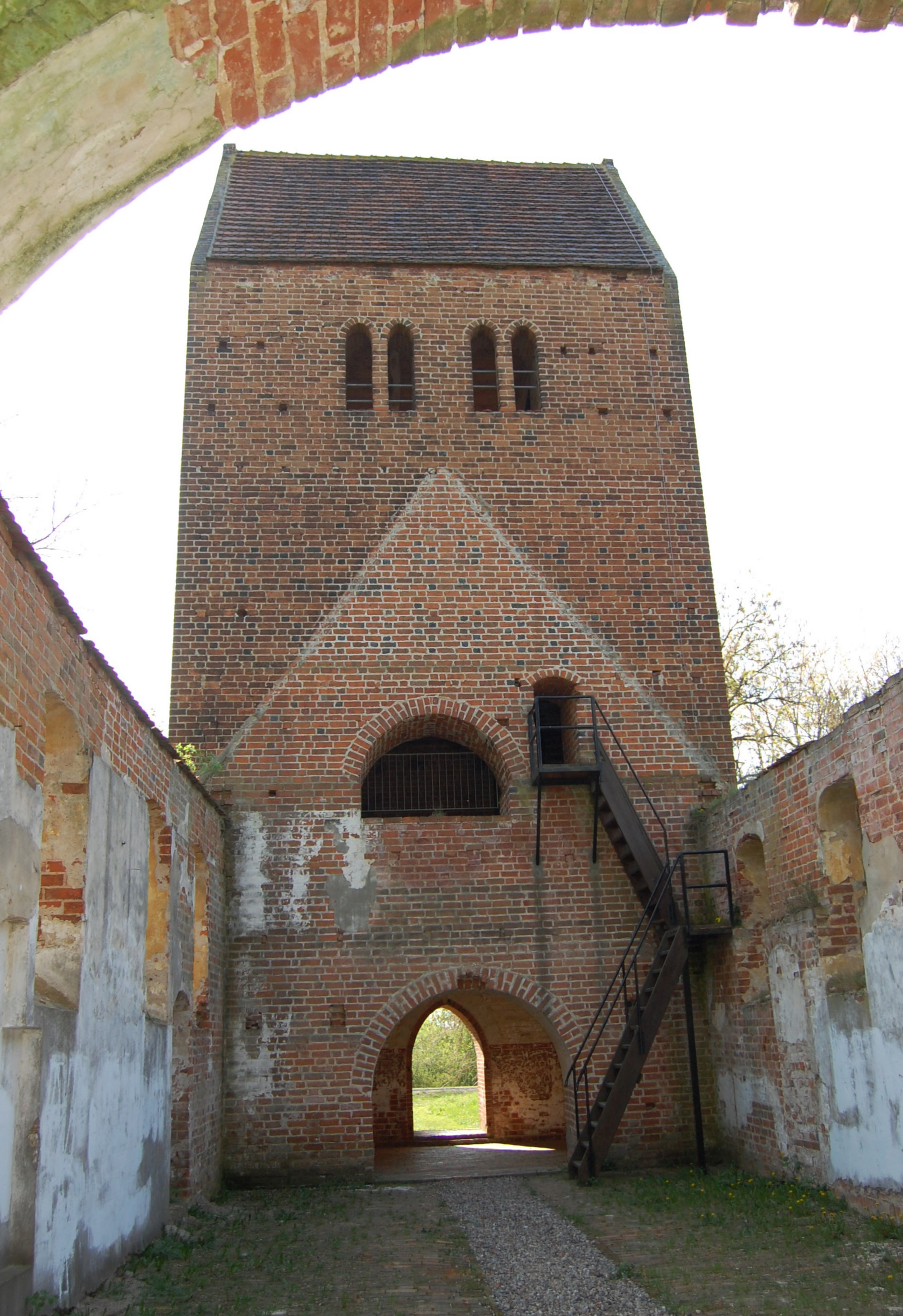 Blick aus dem Kirchenschiff der Kirchenruine Käcklitz